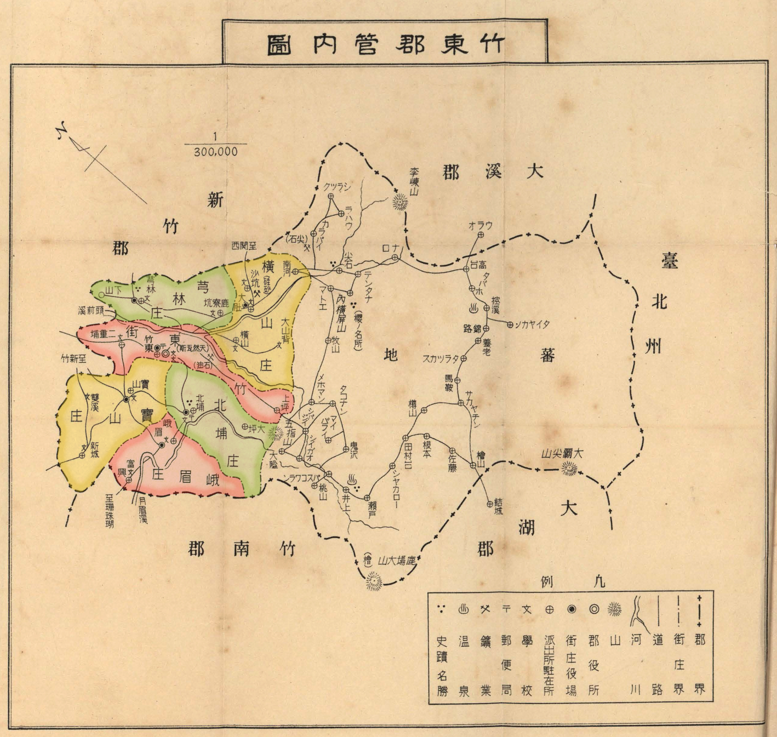 中文（台灣）: 竹東郡地圖，包含竹東街、芎林庄、橫山庄、北埔庄、峨眉庄、寶山庄以及蕃地。